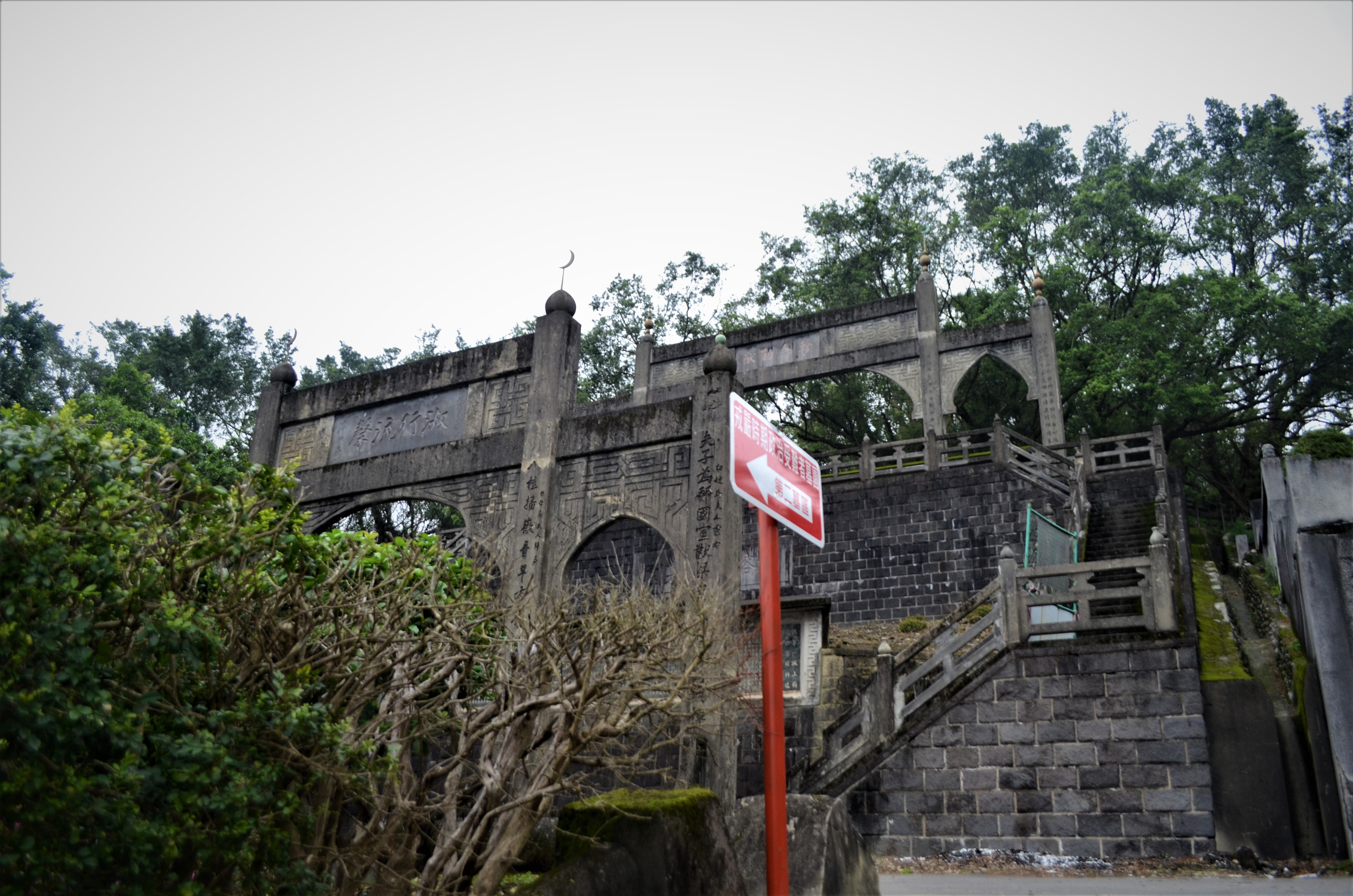 中文（台灣）: 白榕蔭堂墓園(白崇禧將軍墓)民國52年，白夫人馬佩璋女士過世，白崇禧將軍於回教公墓內闢建｢白榕蔭堂墓園｣，為白將軍留學美國學建築之兒子所設計、大陸工程公司興建，殆民國55年白崇禧將軍過世後亦安葬於此。